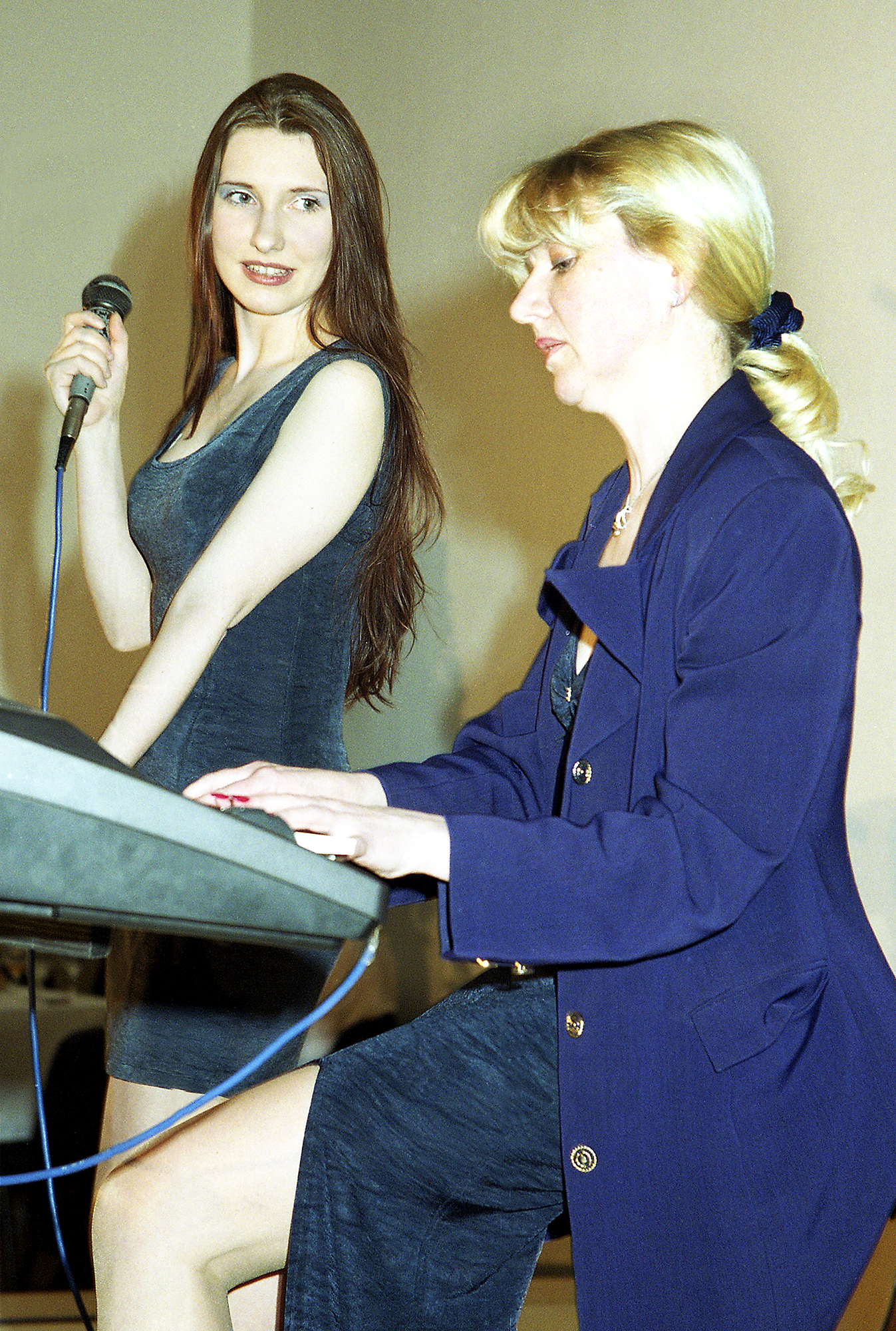 Janika Sillamaa ja ema Kaari Sillamaa 2001